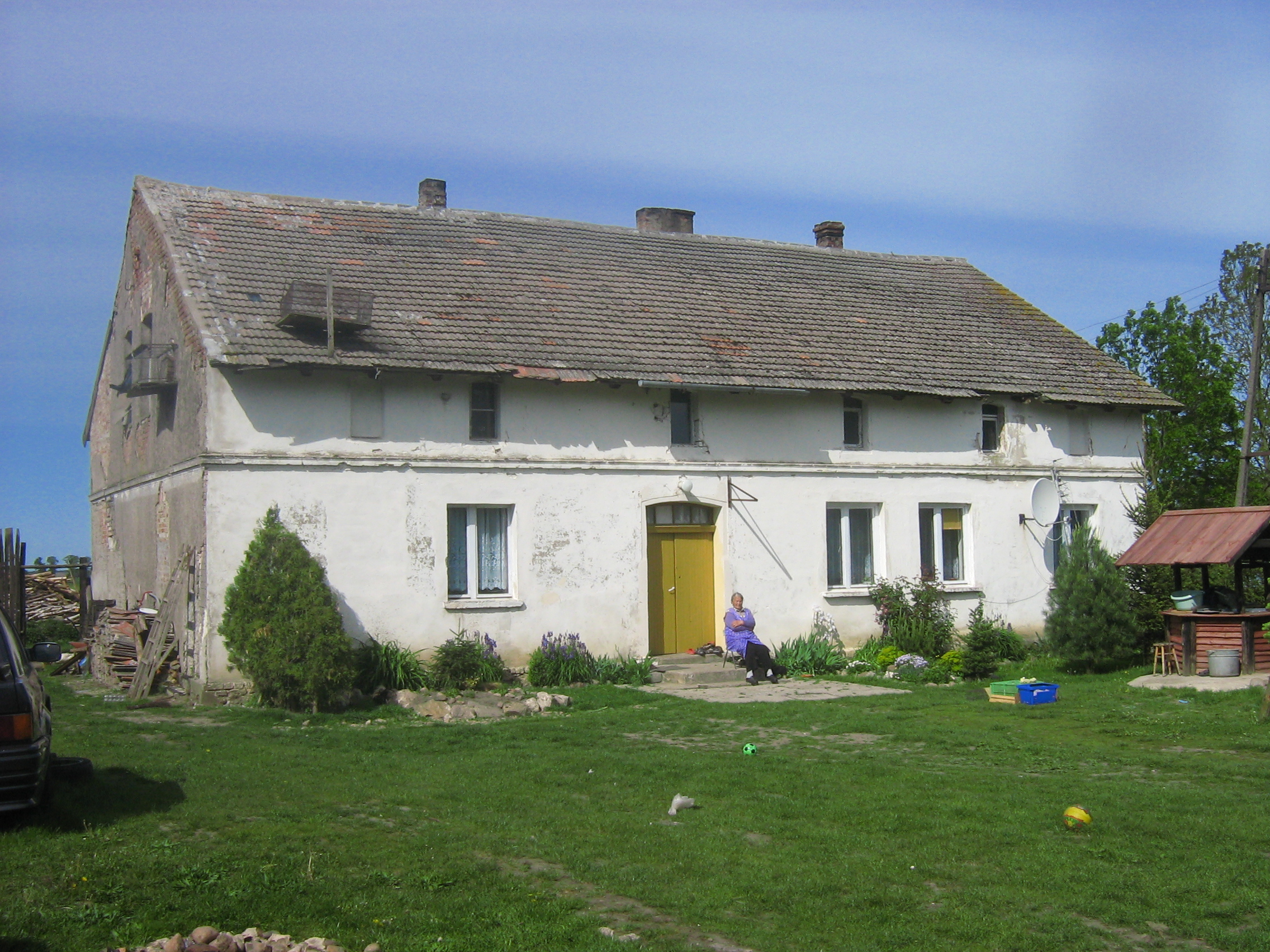 Zabytkowy dom z numerem 7